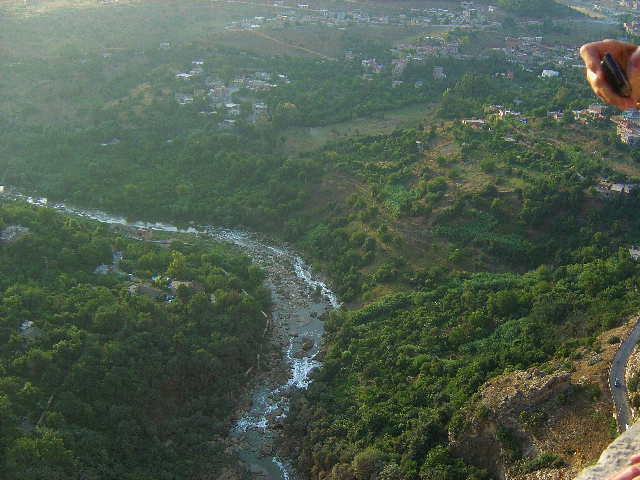 plaine du rhummel